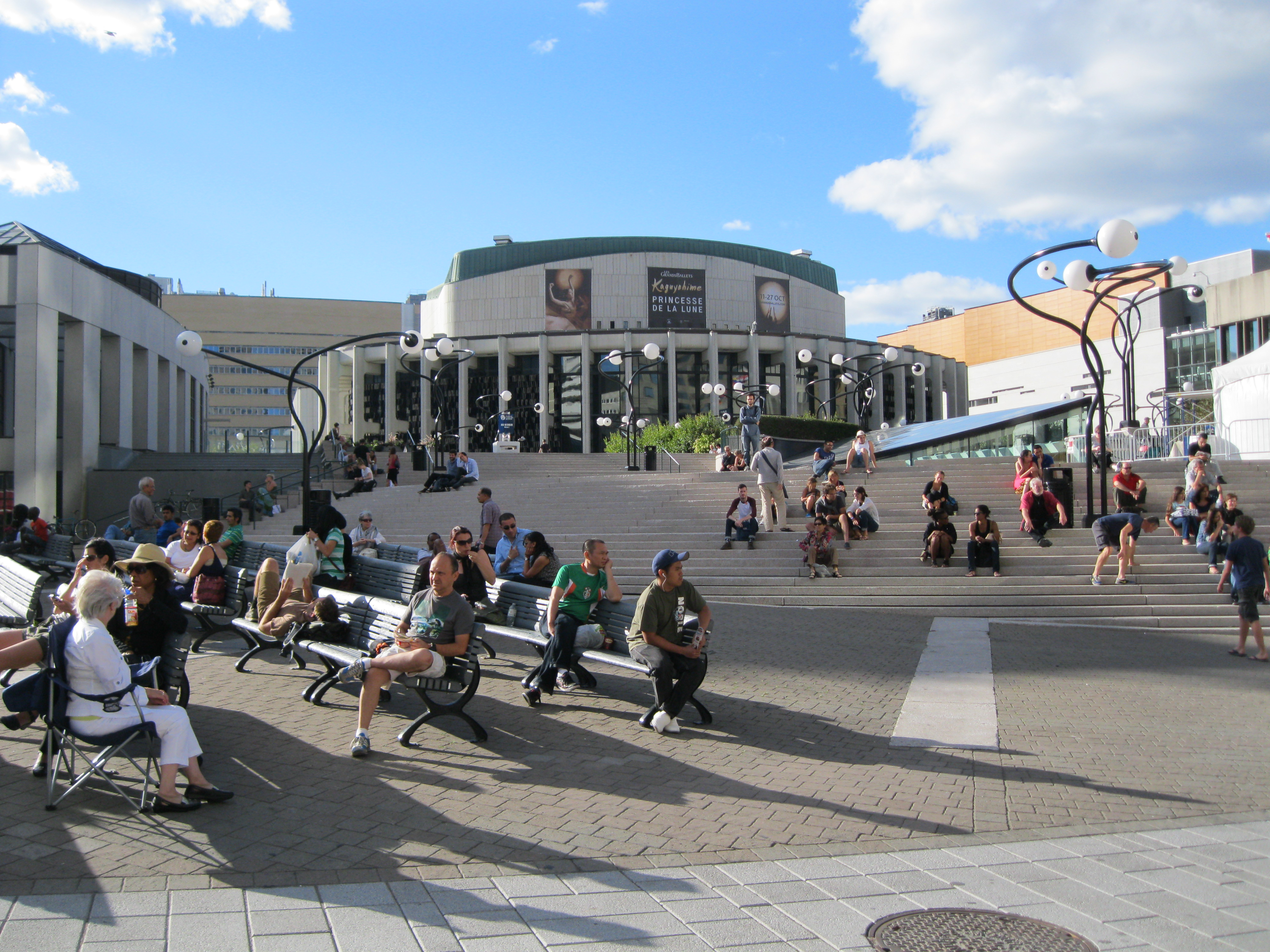 Place des Arts, Montréal